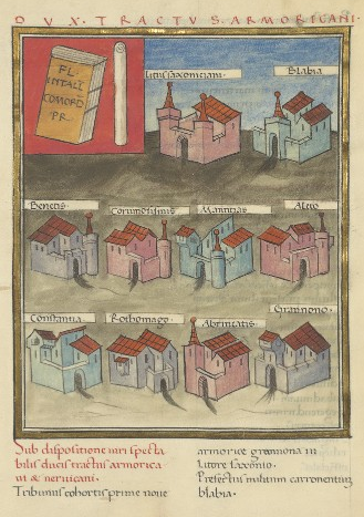 Cote : Latin 9661 Folio : 139 Auteur, titre : notitia dignitatum Titre d'usage : Nom de pays : france Origine : savoie Siècle : 15ème siècle Date : vers 1440 Artiste : péronet.lamy